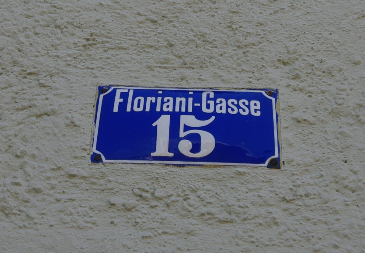 Altes Emailleschild mit Hausnummer; alte Schreibweise mit Bindestrich, veraltete Bezeichnung (anstatt Florianiplatz)